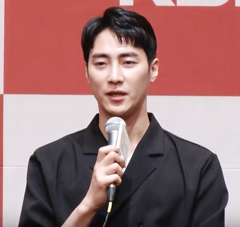 배우 오창석, 윤소이, 최성재, 하시은이 30일 오후 서울 구로구 라마다 서울 신도림에서 열린 KBS 2TV 일일극 ’태양의 계절’ 제작발표회에 참석했다.